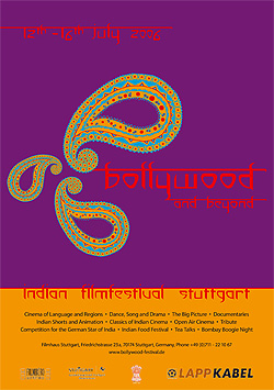 Plakat 2006